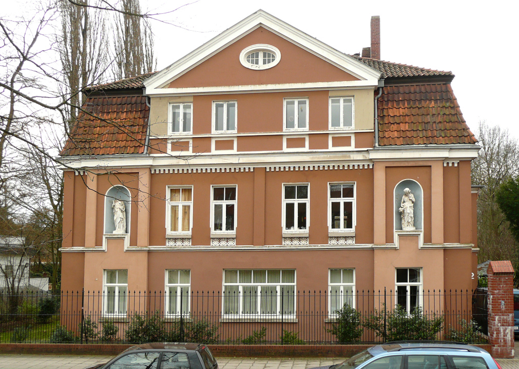 Direktorenvilla der Döhrener Wolle, Wiehbergstraße 22, denkmalgeschützt.